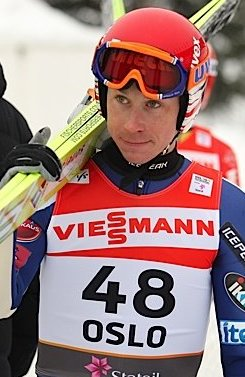 Janne Happonen podczas serii treningowej przed konkursem indywidualnym mężczyzn na Mistrzostwach Świata w Narciarstwie Klasycznym 2011 w Oslo.